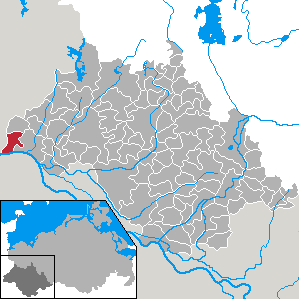 Nostorf in Mecklenburg-Vorpommern - district Ludwigslust